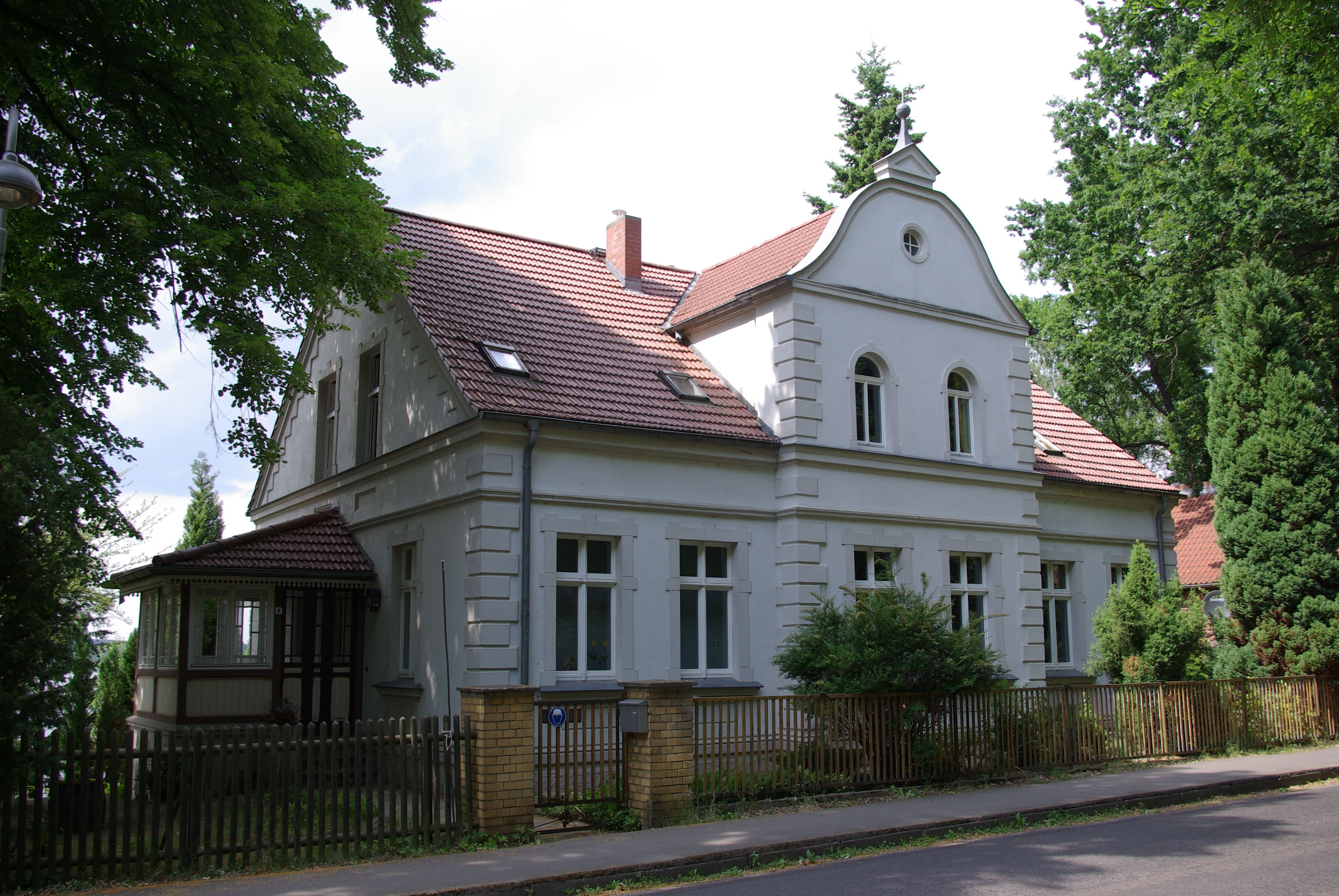 Diensdorf-Radlow in Brandenburg. Das Haus in der Hauptstraße 9 steht unter Denkmalschutz.